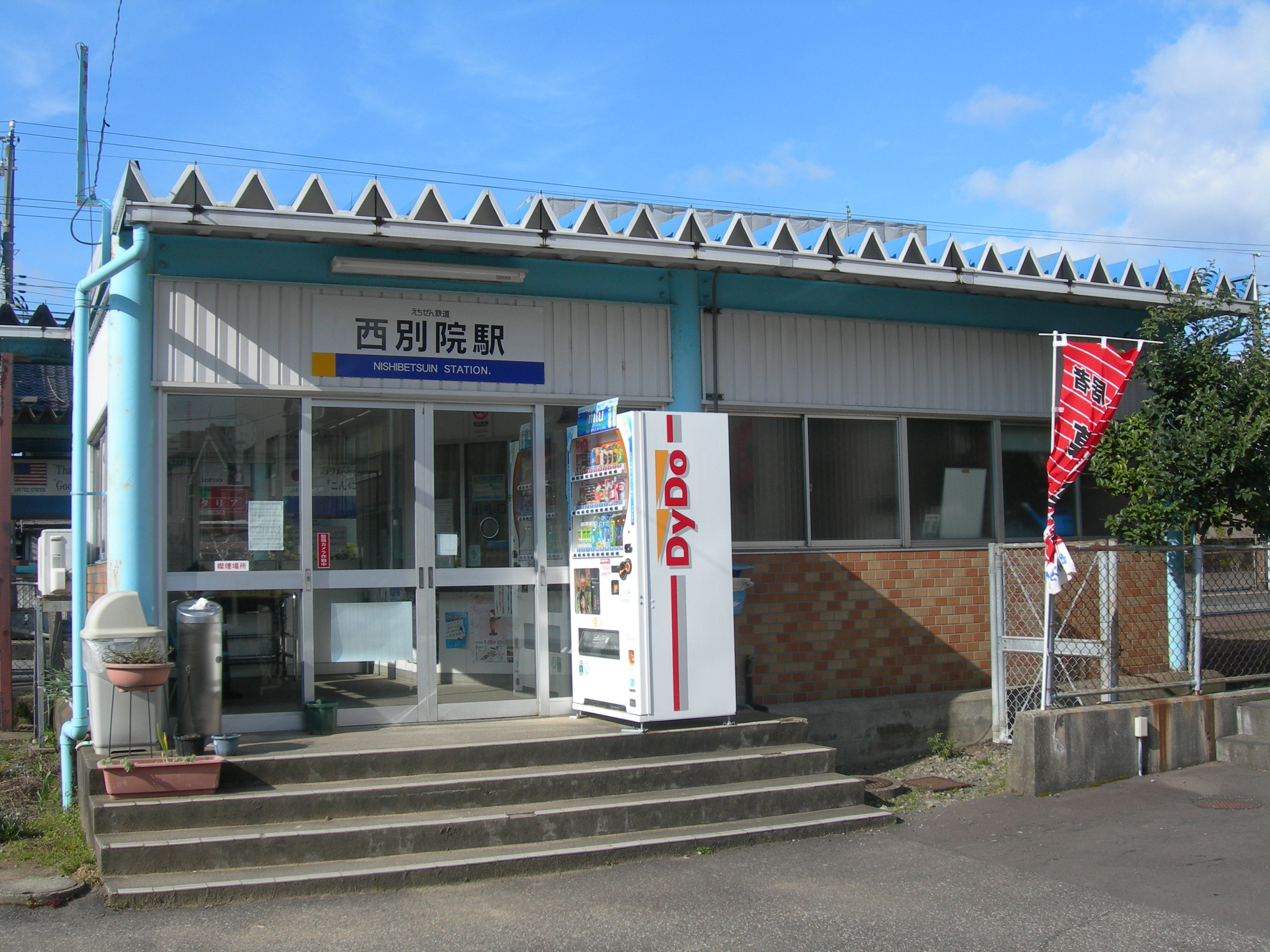 西別院駅